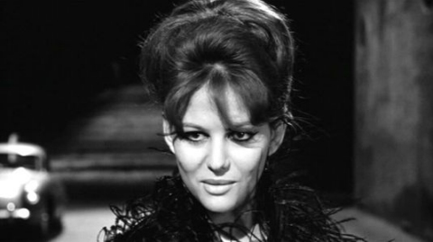 Screenshot del film 8½ (1963)